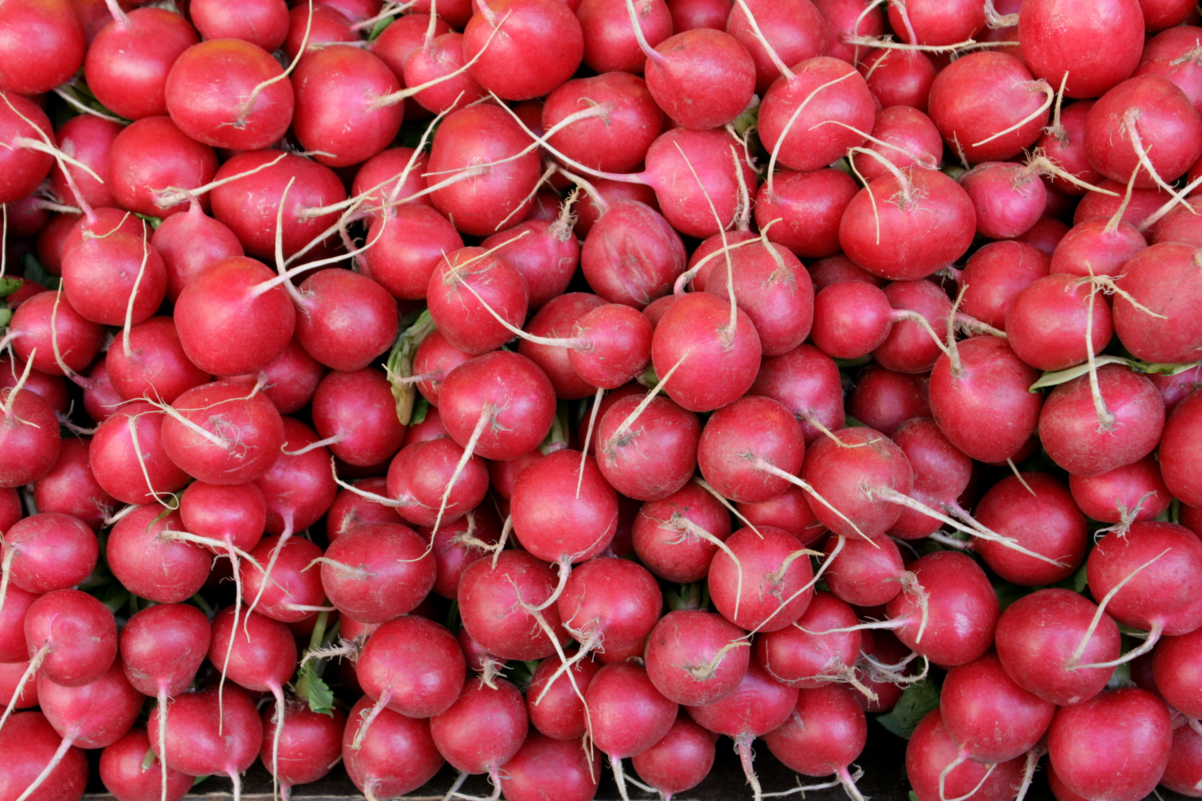 Bauernmarkt in Remscheid-Lüttringhausen